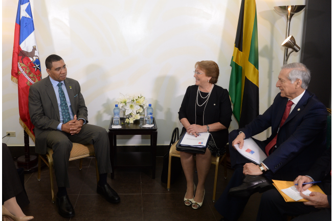 Reunión bilateral entre el Primer Ministro de Jamaica, Andrew Holness, y la Presidenta de la República de Chile, Michelle Bachelet, acompañada del Canciller Heraldo Muñoz, en julio de 2016